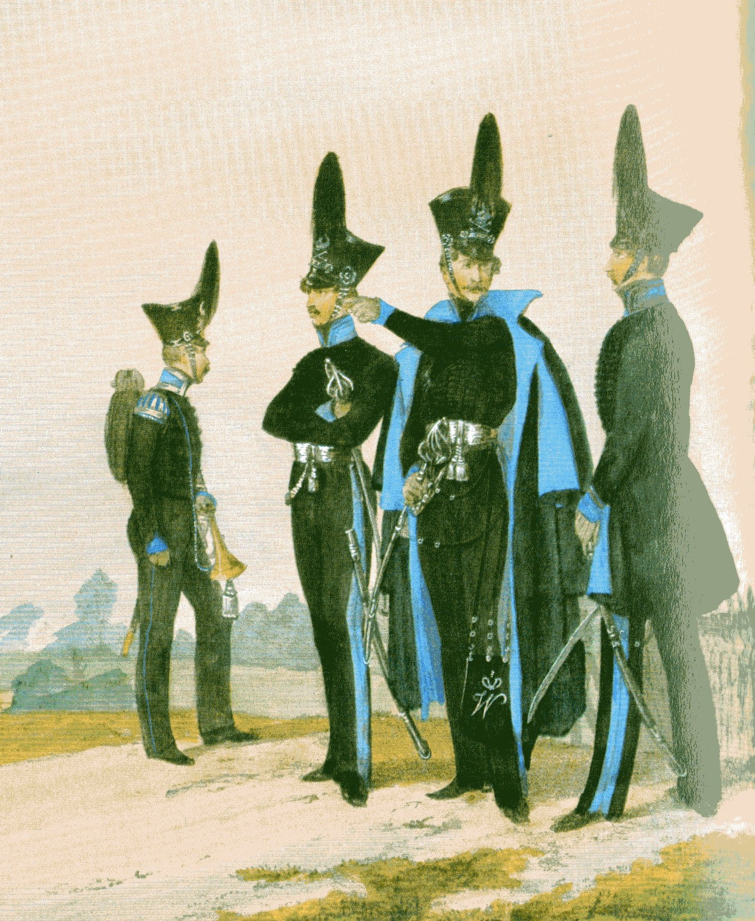 Braunschweigisches Leibbataillon um 1835. Links ein Hornist, rechts drei Offiziere.